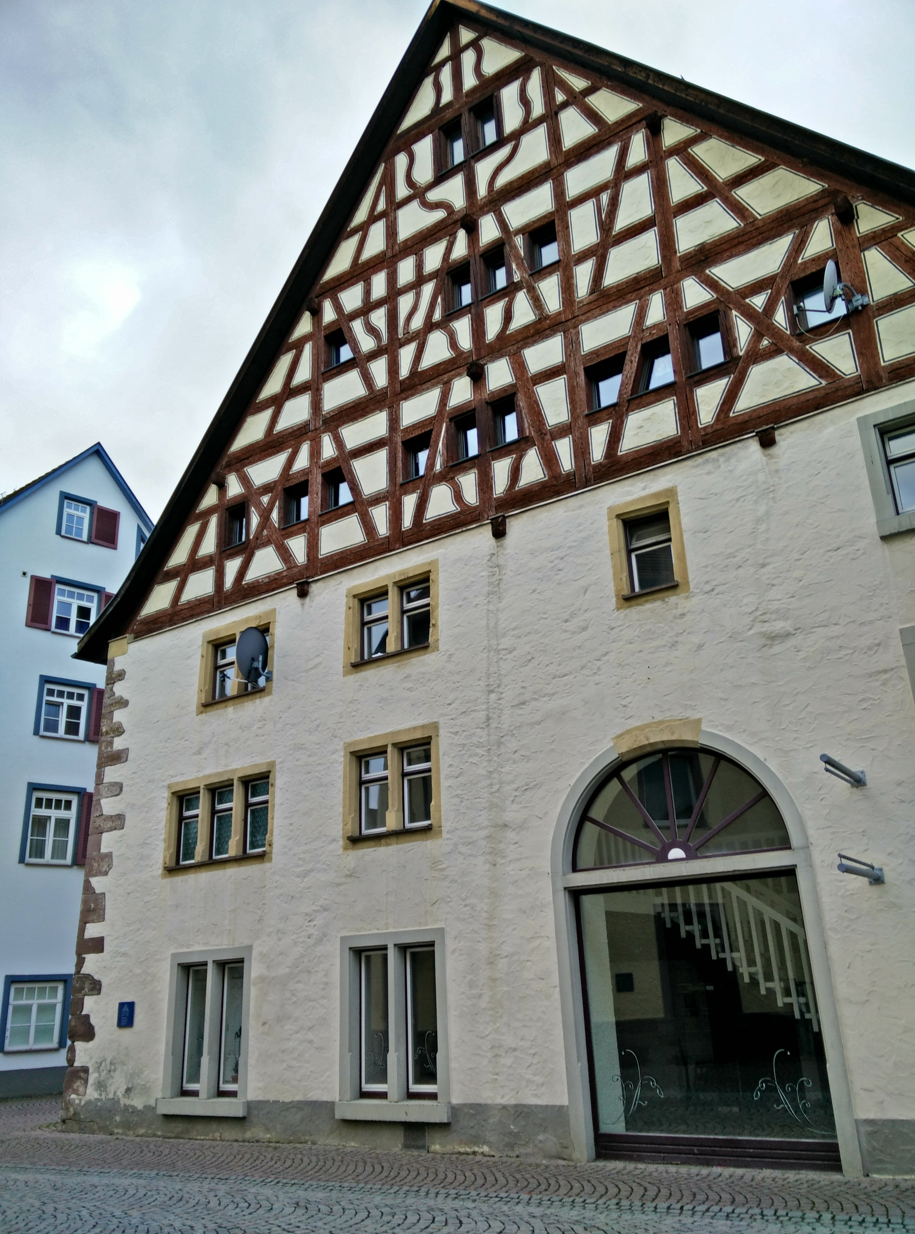 Bärenstraße